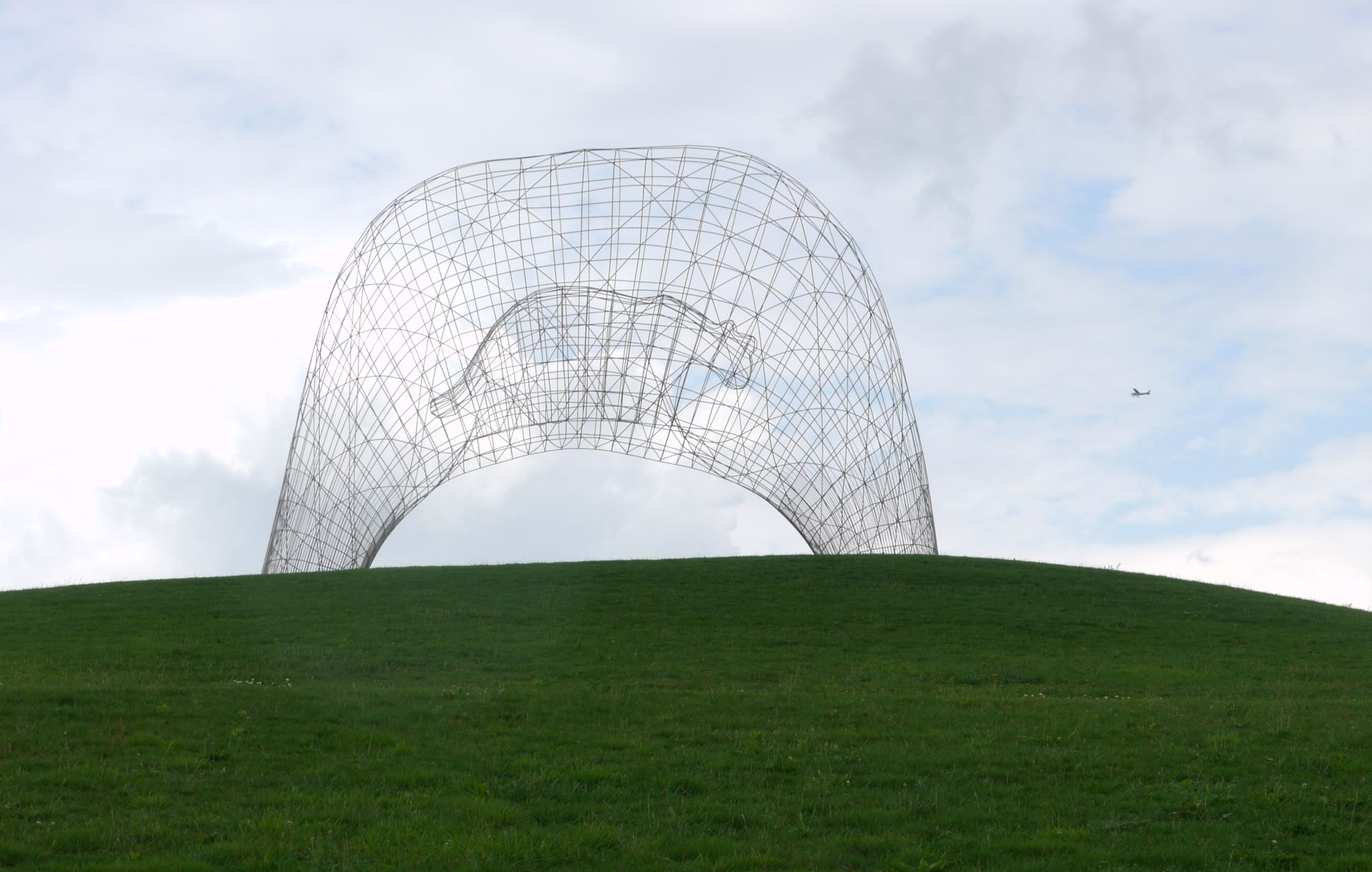 Beeld "Kooi-Met-Geen-Poema-Er-In"/"Cage with No Puma In It" sculpture, by Maarten de Reus in Apeldoorn/The Netherlands